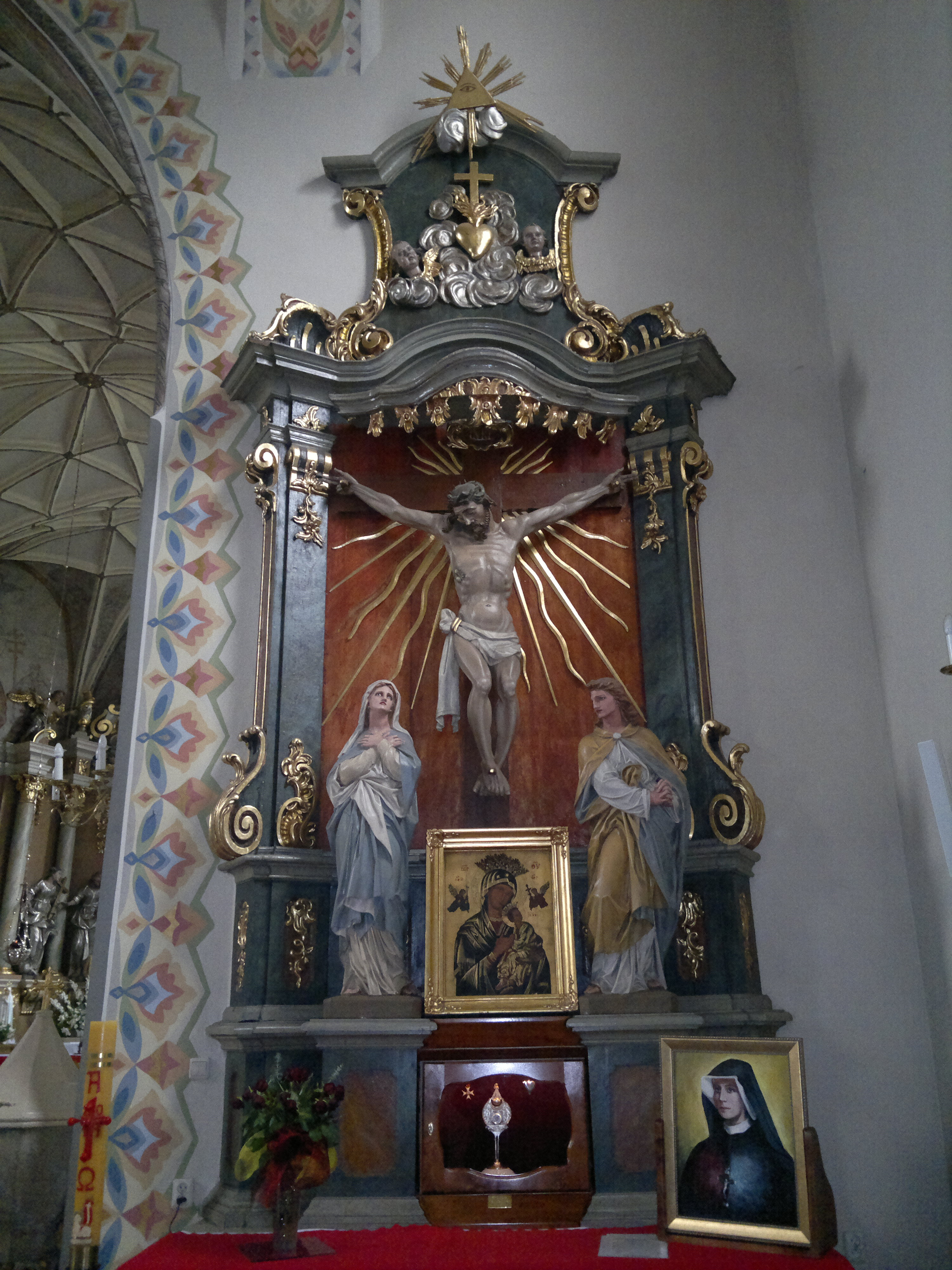 Ołtarz boczny w kościele świętych Apostołów Piotra i Pawła w Kostrzynie